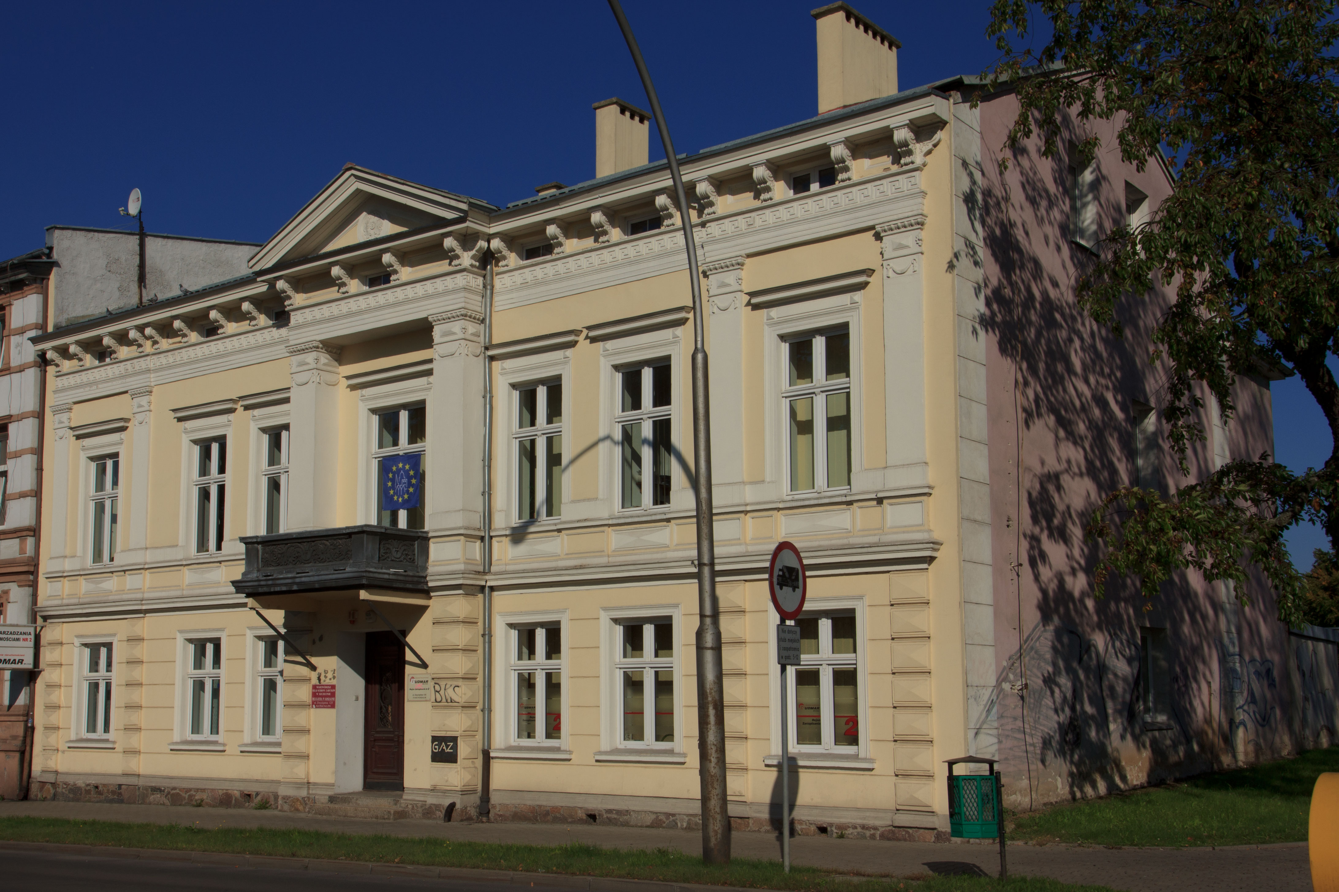 Koszalin, ul. Zwycięstwa 125 - dom (elewacja)